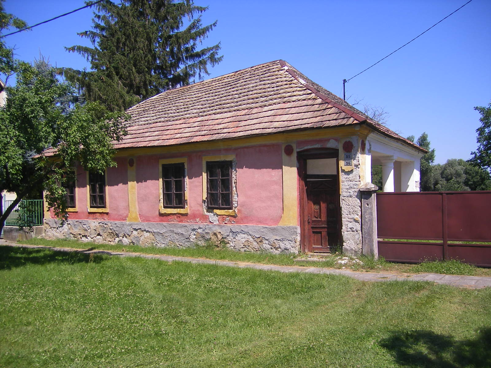 Földszintes, L alakú, oldaltornácos lakóház a faluban. Népi, 19. század. ID 7081. - Pest m., Ipolytölgyes, Kossuth Lajos utca 35-36.